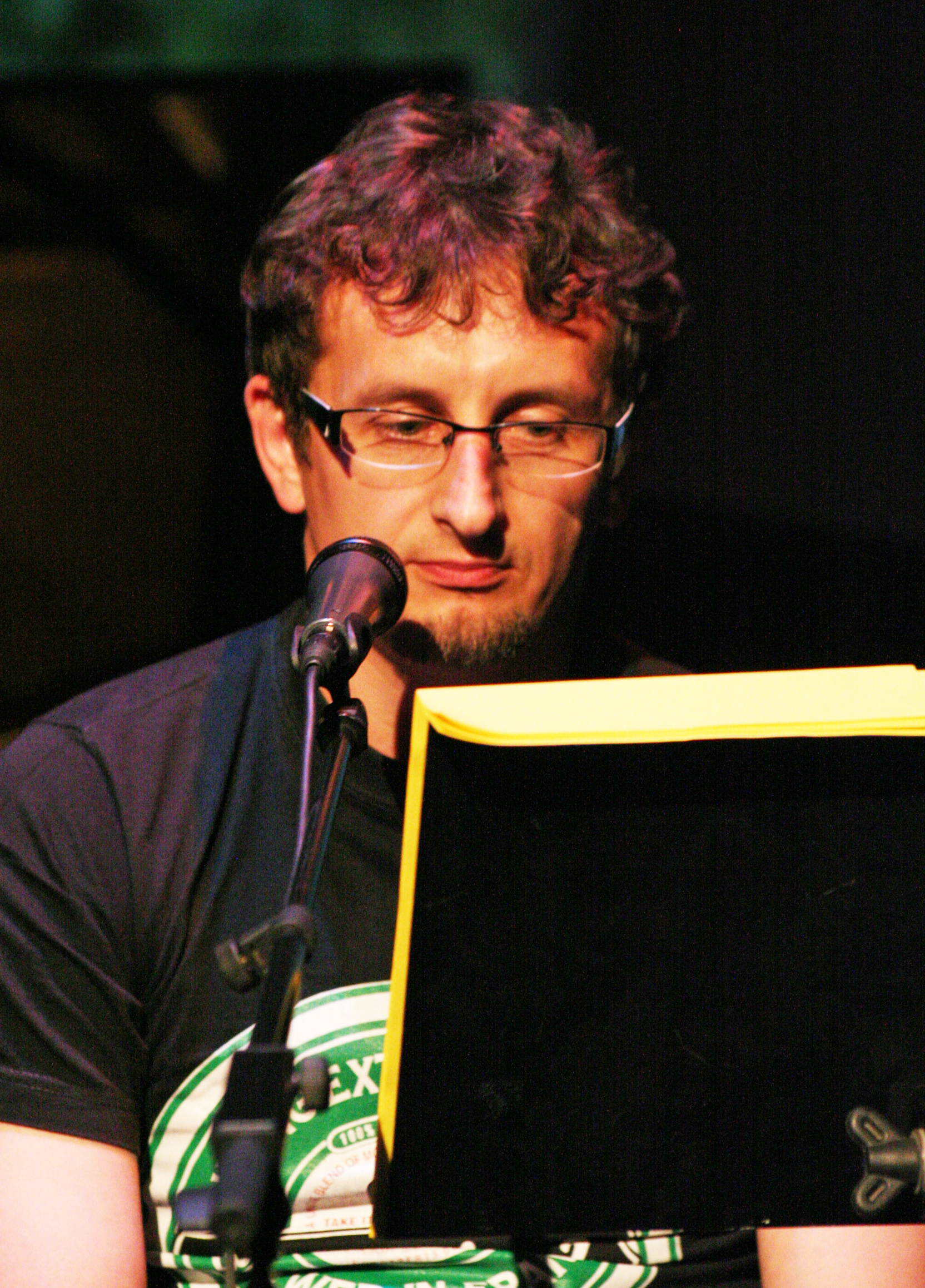 Tomasz Hrynacz, koncert "Poezjobranie"